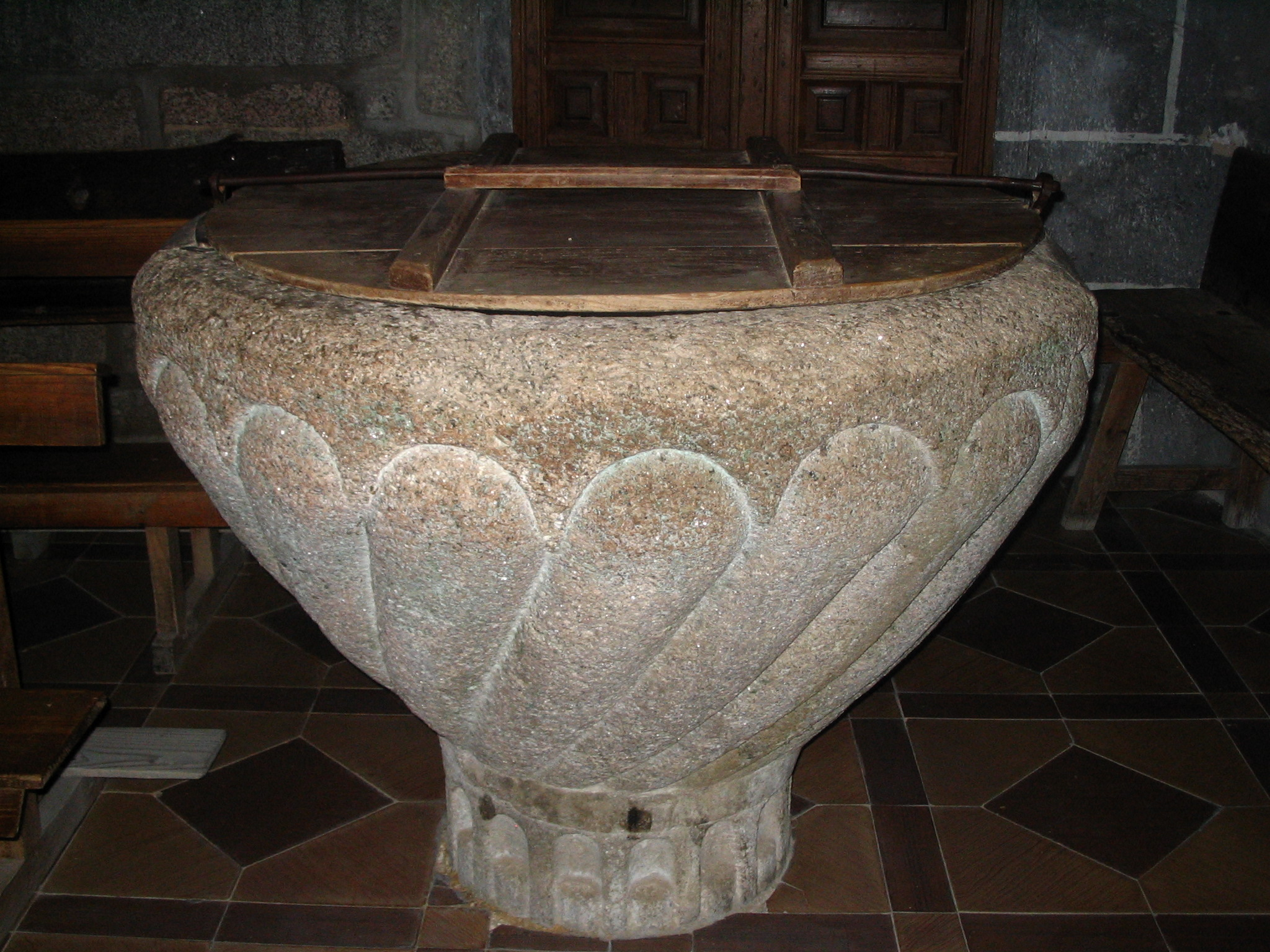 Pila bautismal de la Iglesia de Nuestra Señora del Castillo de Macotera, situada bajo de tribuna.